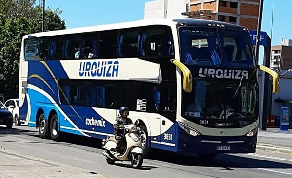 Interno 3831 de la empresa General Urquiza